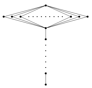 subgroup lattice of an extended Tarski group